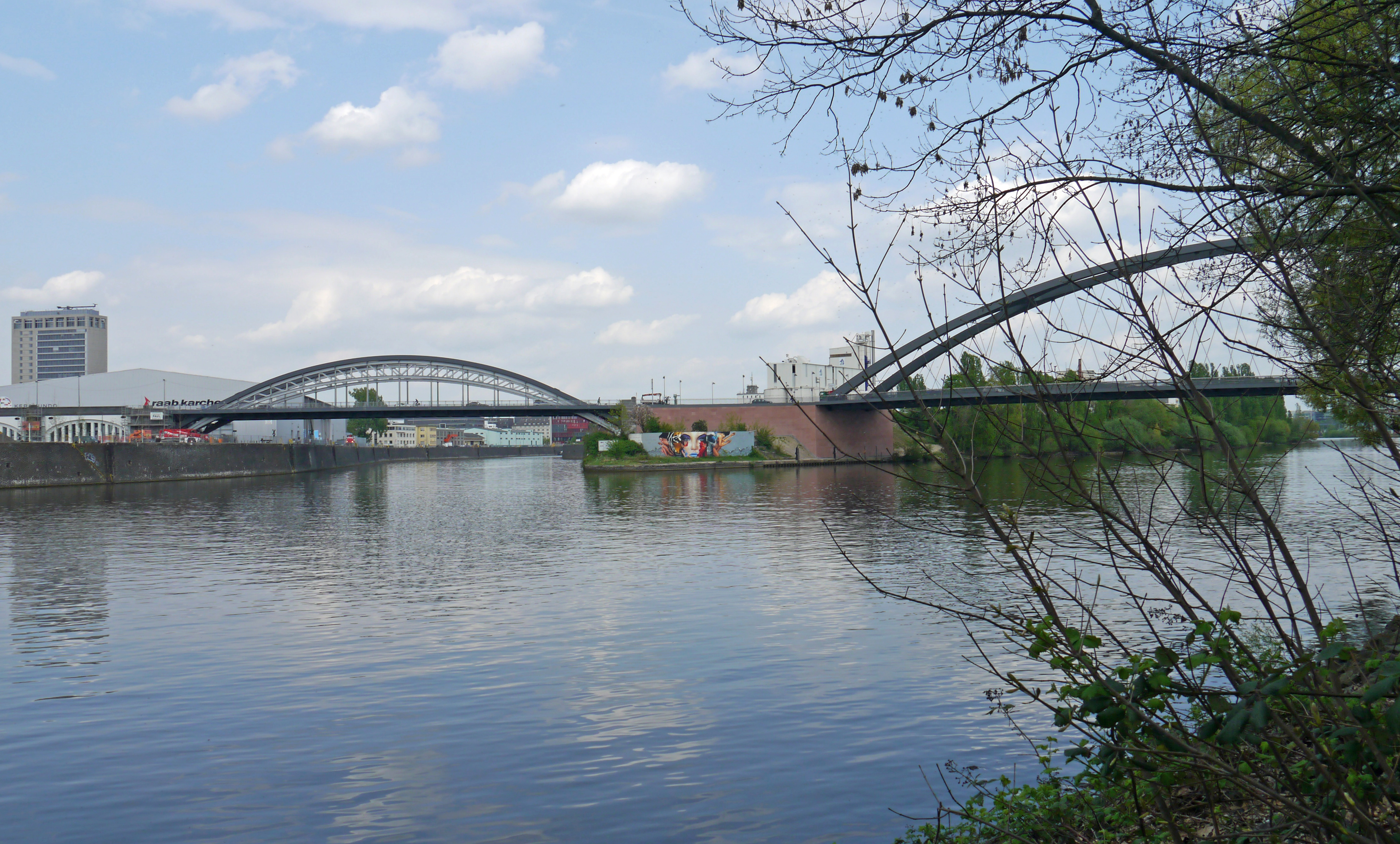 Honsellbrücke und Osthafenbrücke (2014) vom Sachsenhäuser Mainufer gesehen.